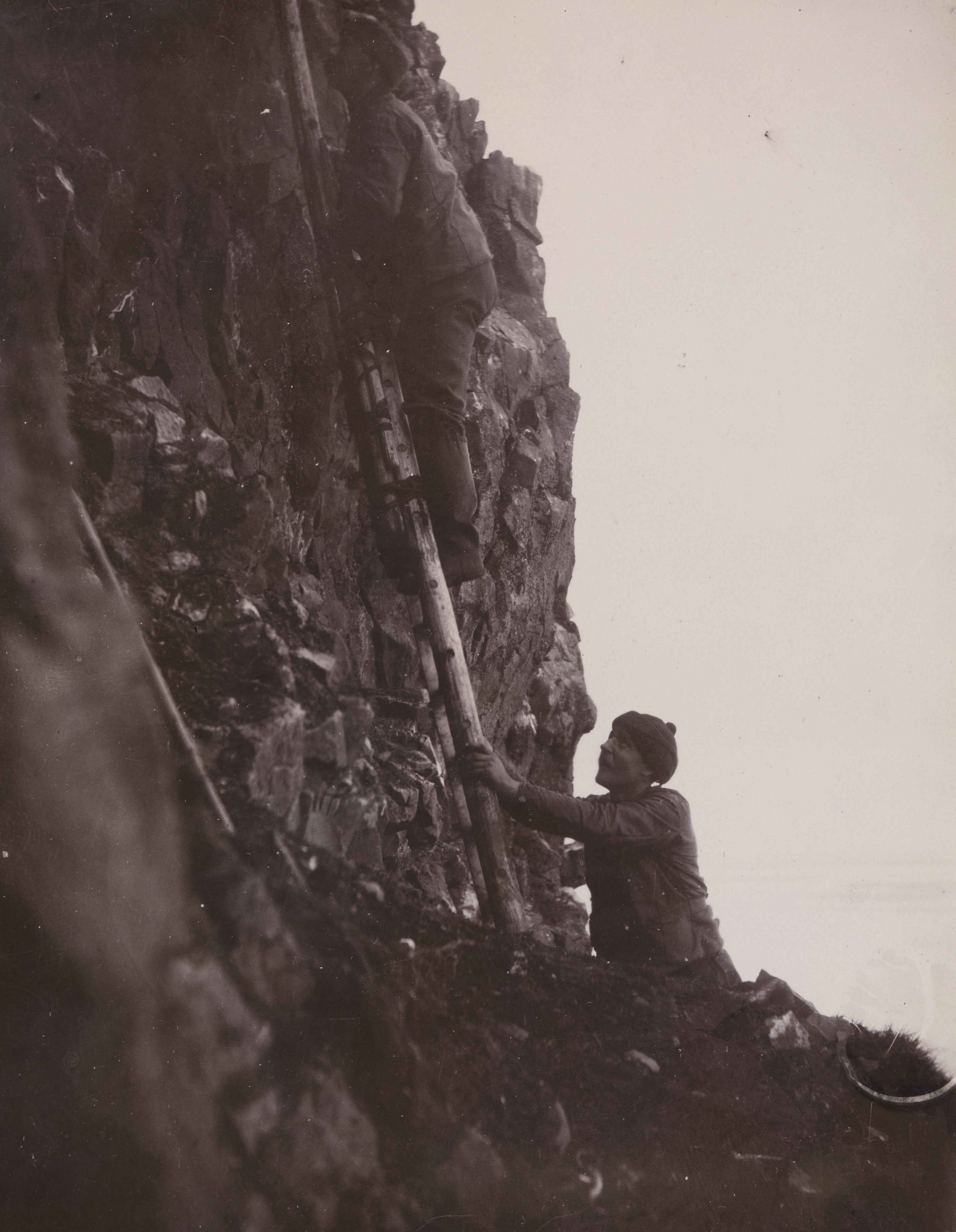 Frederick George Jackson, britisk offiser, polarforsker og leder for ekspedisjonen til Frans Josefs Land 1894-1897 (på stigen) og finnen K. Blomkvist leter etter fugleegg. Ett av bildene fra ekspedisjonen med polarskip mot Nordpolen i perioden 24 juni 1893 til 13 august 1896. Etter planen skulle skipet drive i isen med havstrømmer fra Sibirkysten over Nordpolen mot Grønland. I mars 1895 foretok Fridtjof Nansen og Hjalmar Johansen hasardiøs skiferd med hundesleder i forsøket på å komme til polpunktet. Depicted person: Jackson, Frederick George (1860-1938) Depicted person: Blomkvist, K. Depicted place: Russland, Frans Josefs Land, Kap Flora